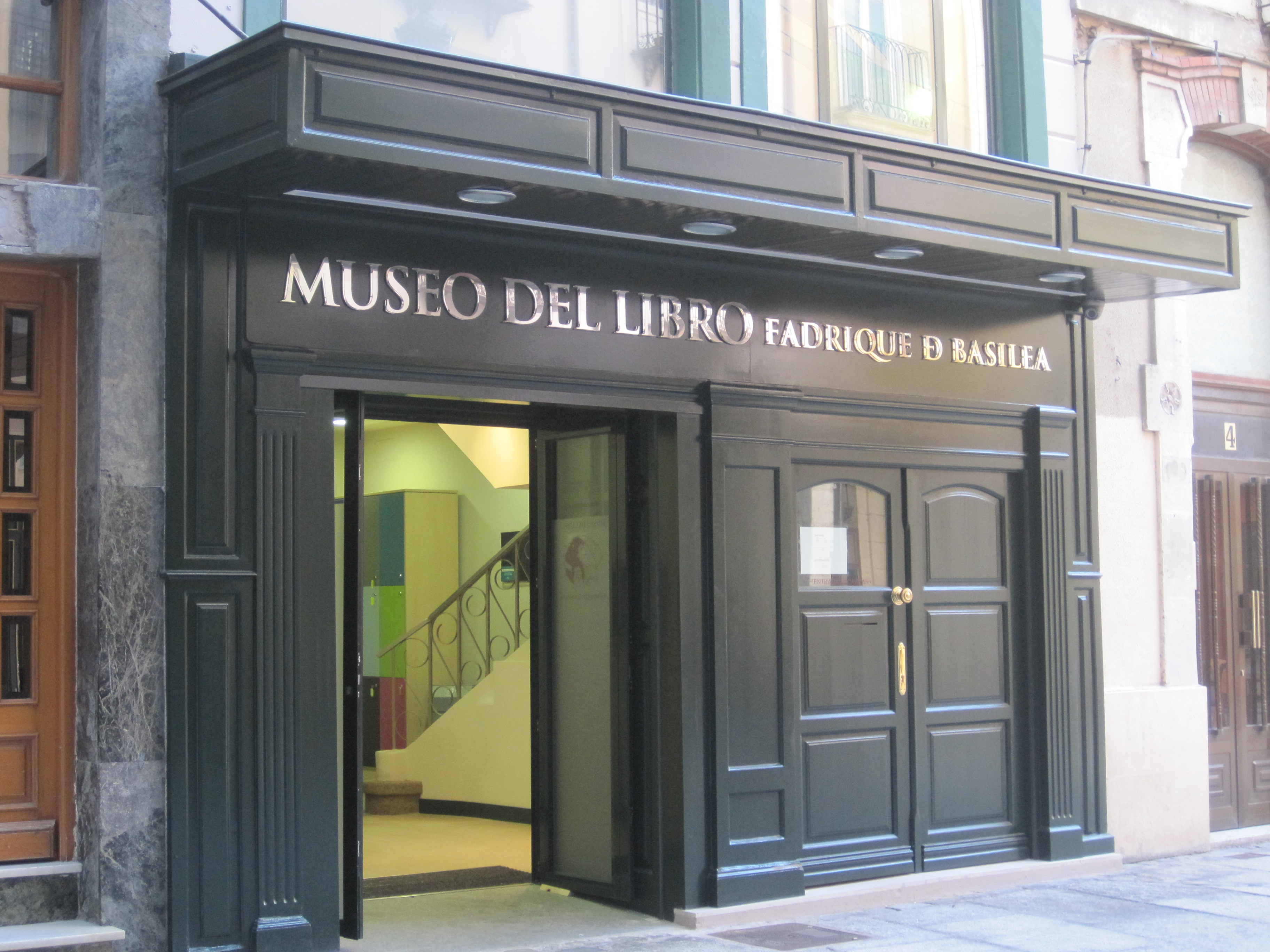 Vista del acceso al Museo Fadrique de Basilea en Burgos.